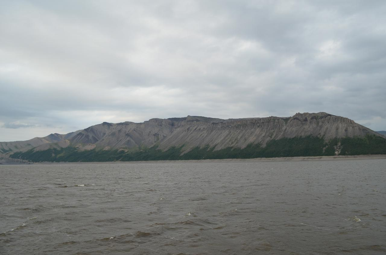 Берега Лены, Булунский район. Это хребет Туора-Сис - западный отрог Хараулахского хребта, непосредственно примыкающий к реке Лена